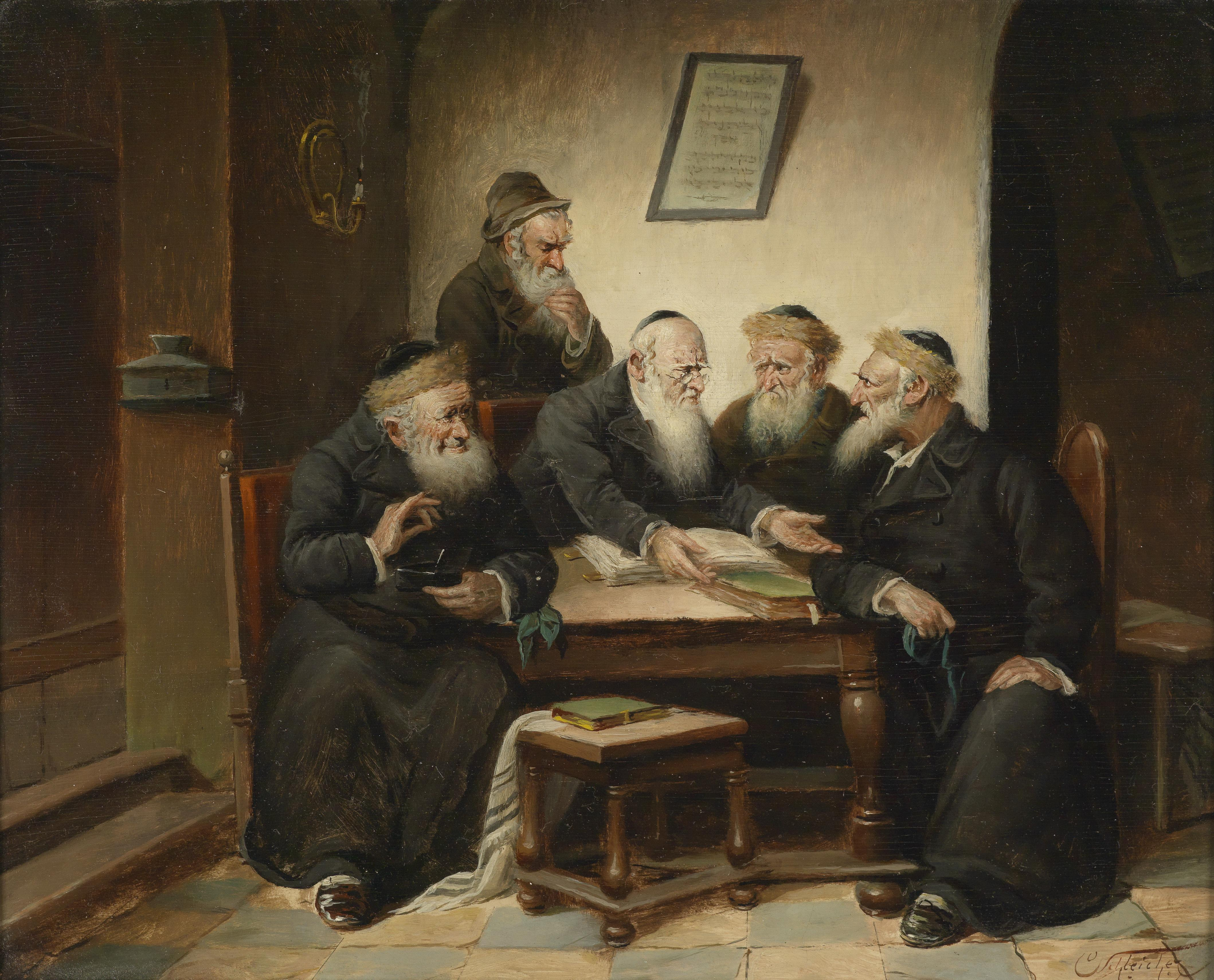 Beim Rabbititle QS:P1476,de:"Beim Rabbi" label QS:Lde,"Beim Rabbi"